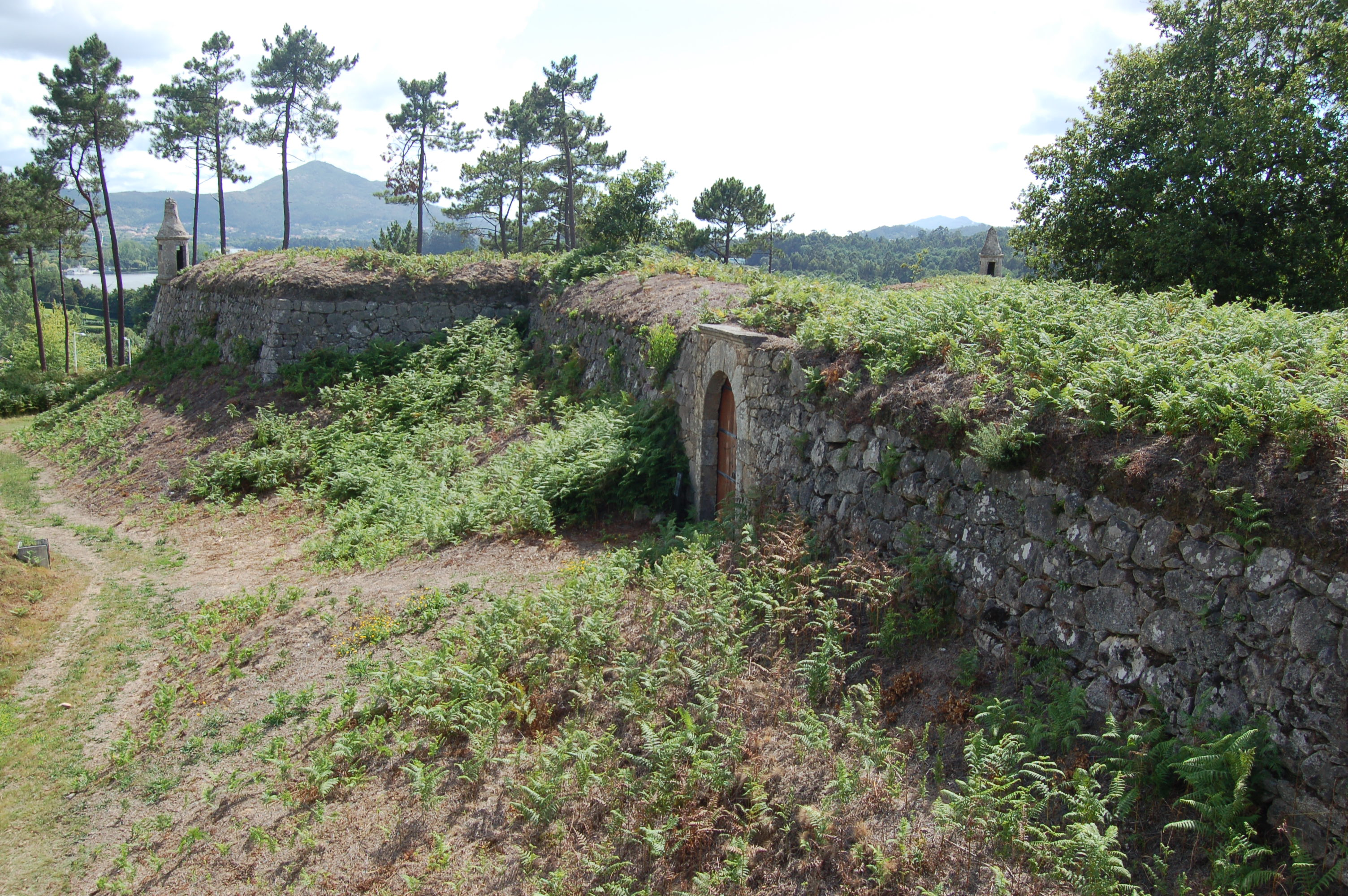 Forte de San Francisco de Lovelhe, en Lovelhe (Portugal). Categoría:Imaxes de castelos e fortalezas Categoría:Imaxes de Portugal